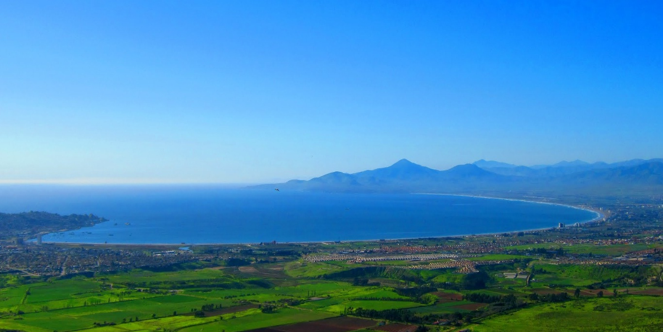 La Serena Coquimbo conurbacion